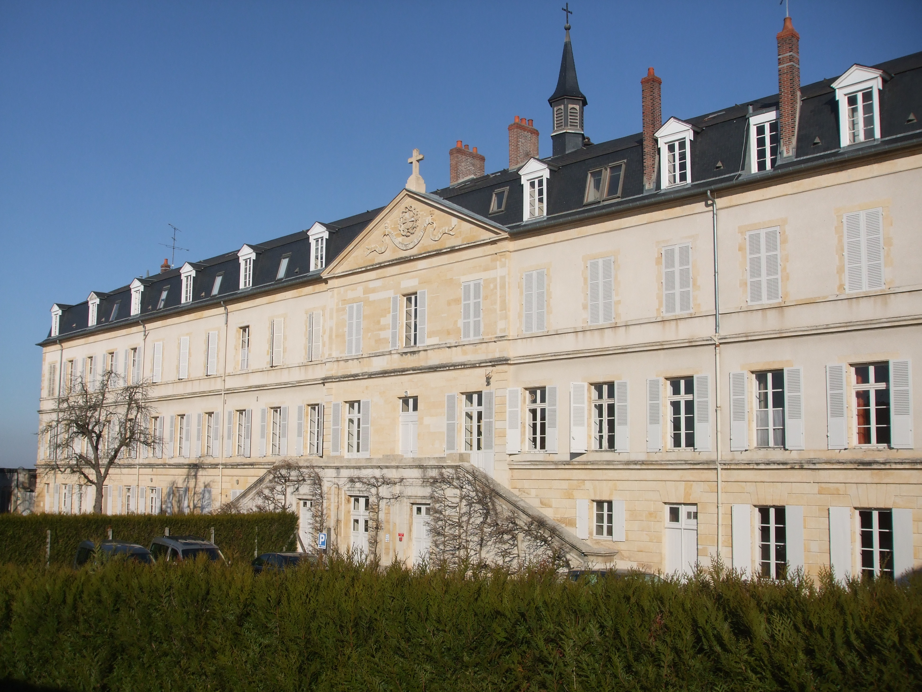 façade sud